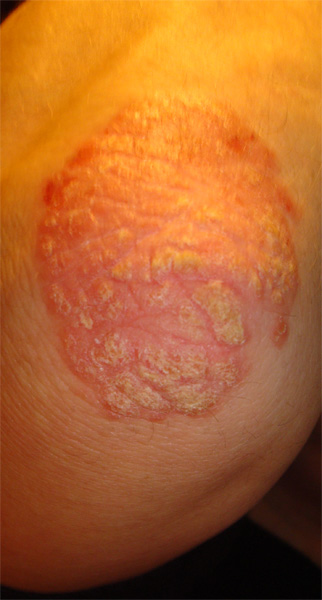 Psoriasis am Ellebogen